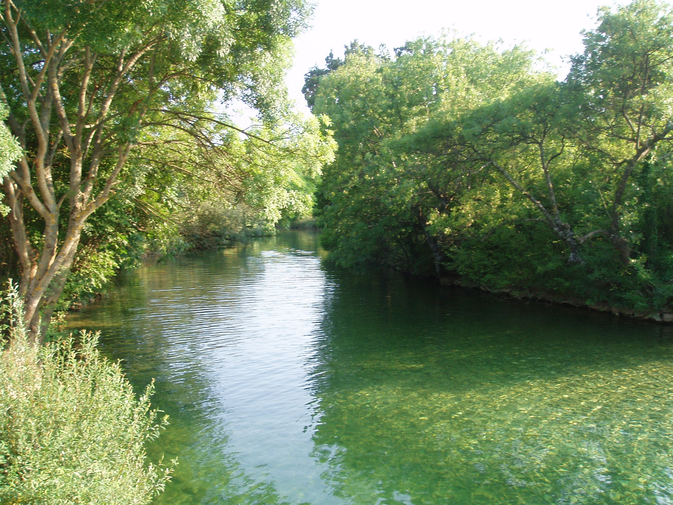 Zrmanja